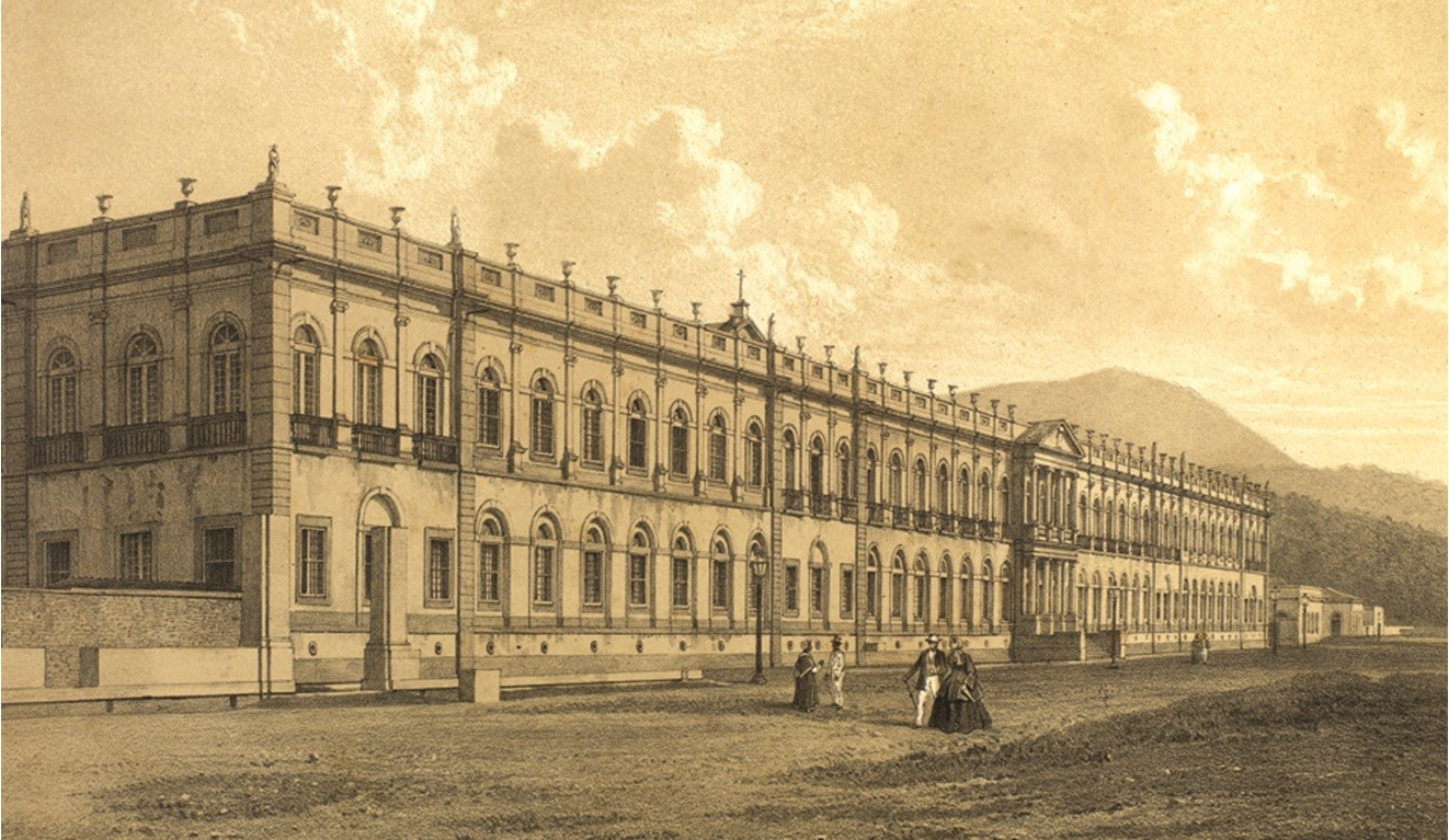 Fundo Correio da Manhã.